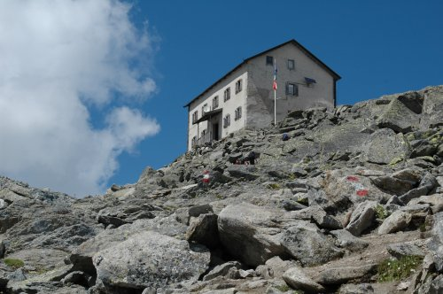 Schwarzensteinhütte